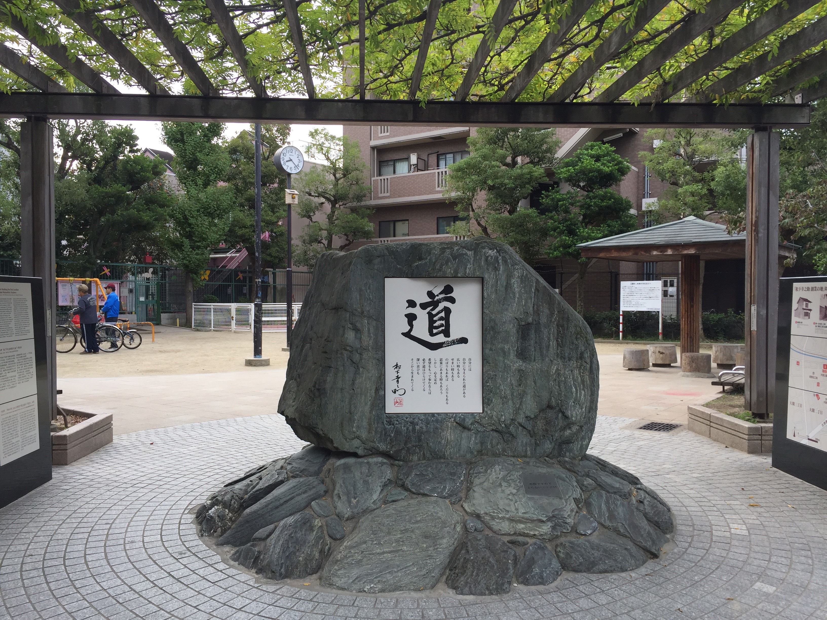 松下幸之助創業の記念碑（大開公園内） 大開2丁目